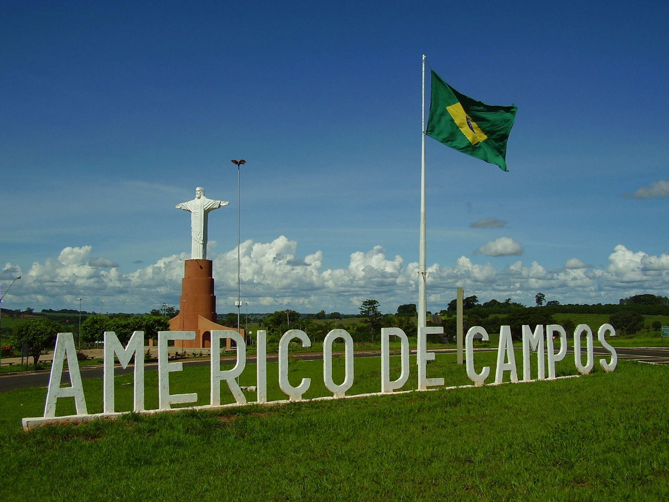 Trevo de acesso à cidade de Américo de Campos